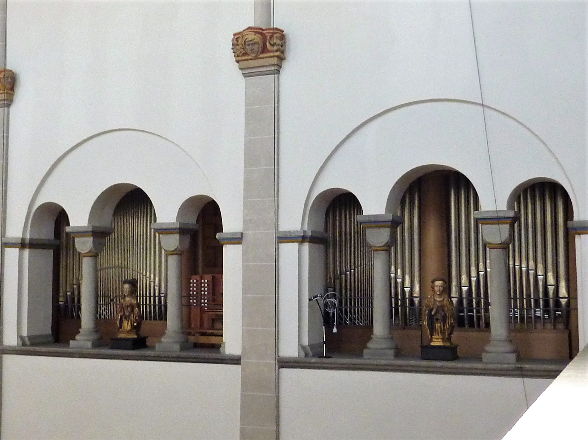 Basilika St. Ursula Köln